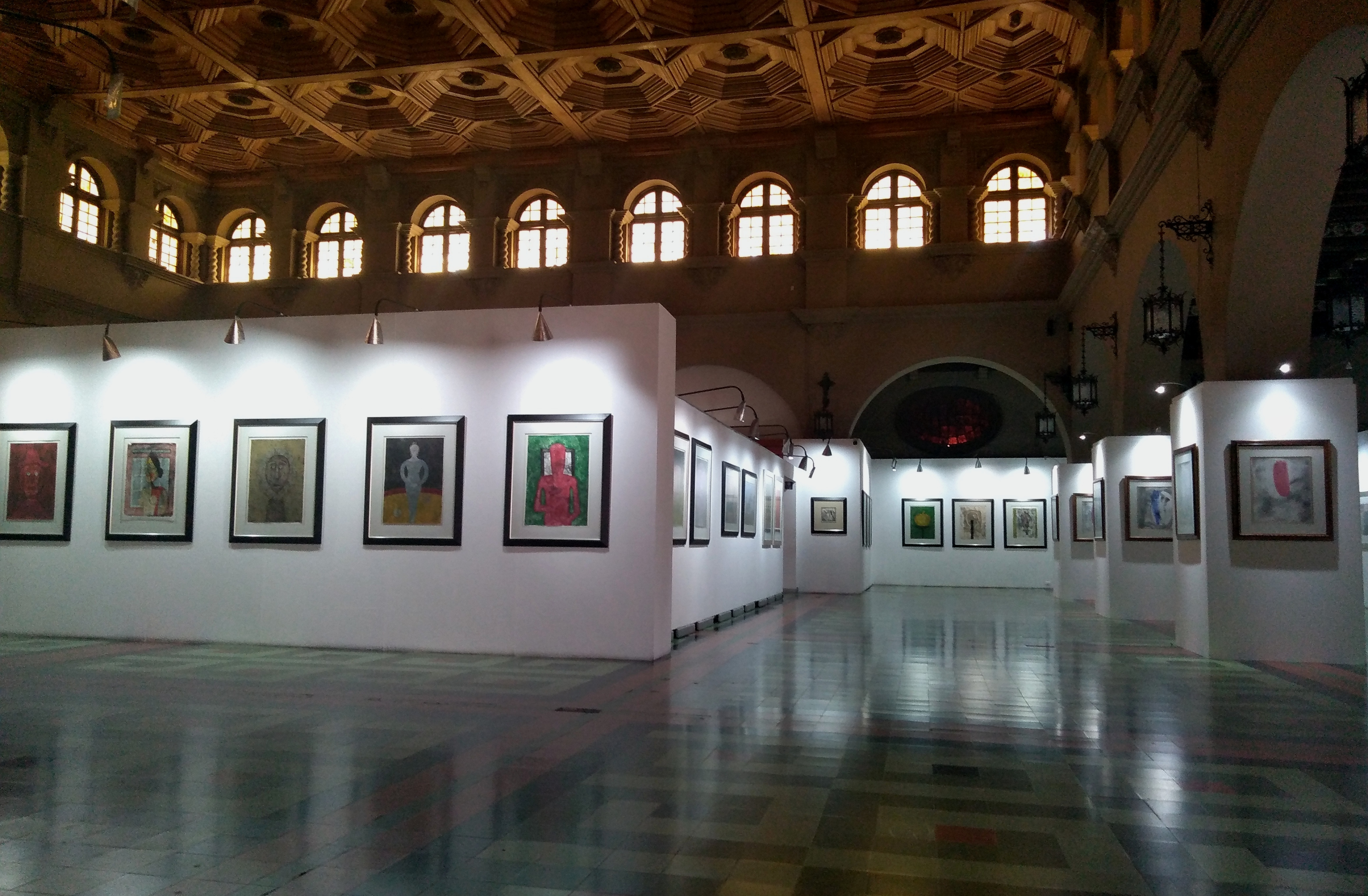 Vista del museo por dentro